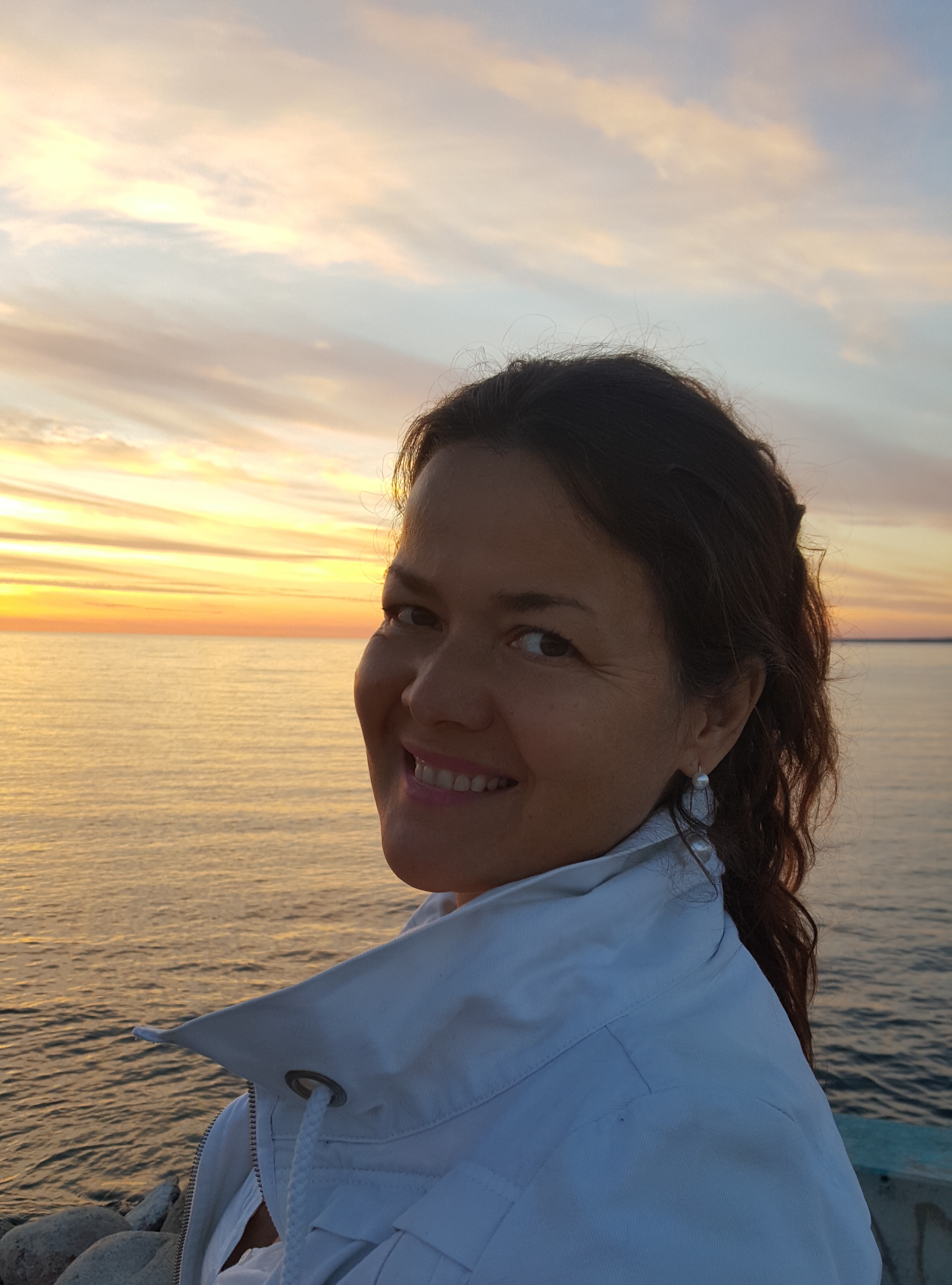 Katrin Aedma